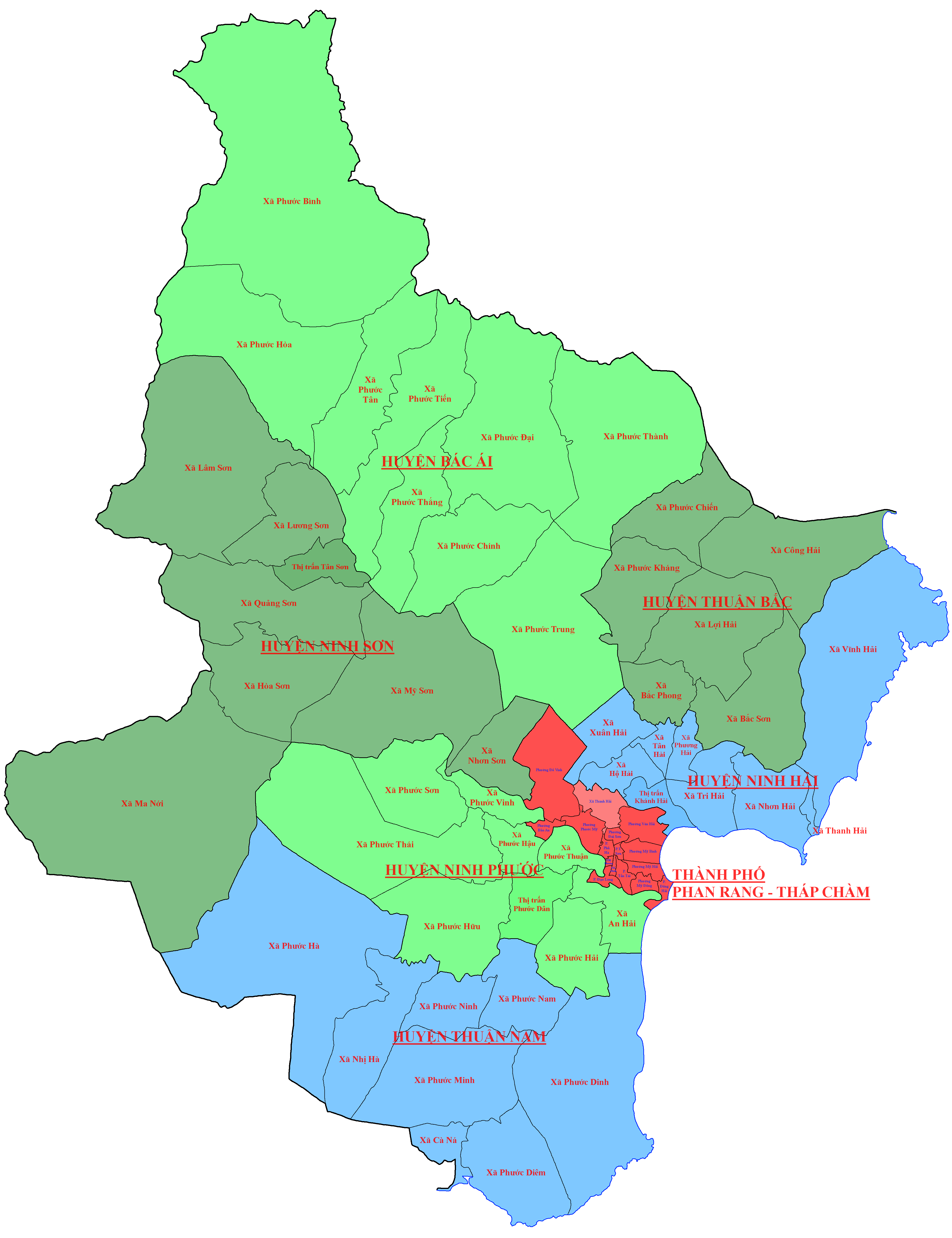 Bản đồ hành chính tỉnh Ninh Thuận - chi tiết đến xã/phường/thị trấn.